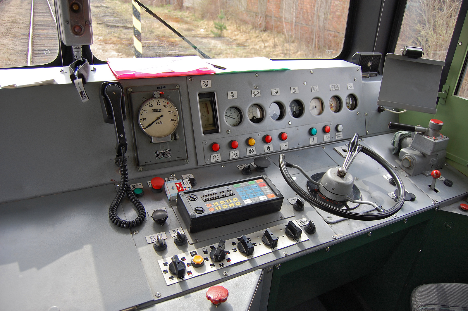 Stanoviště a řídící pult lokomotivy 750.252.